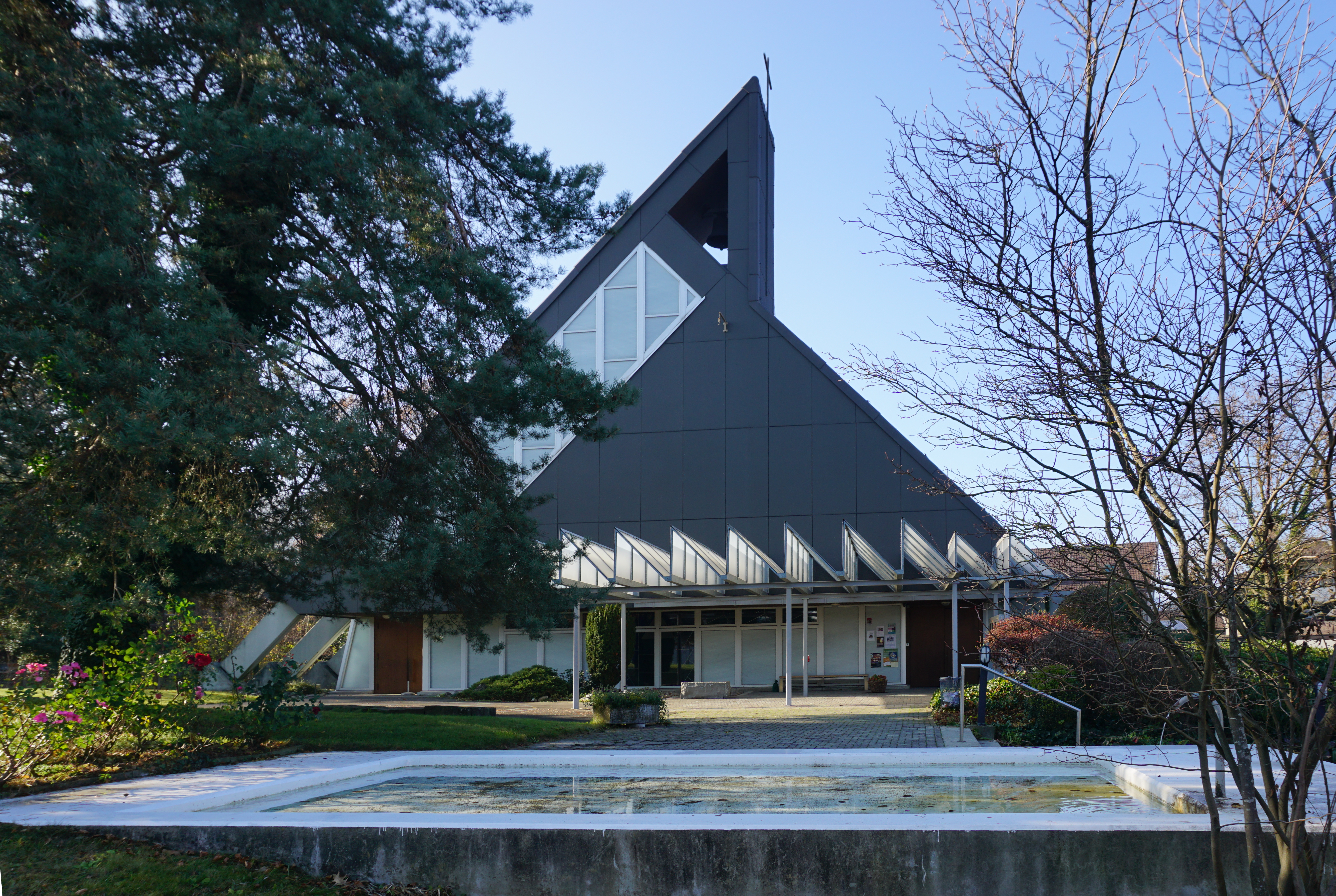 Die Heiliggeist-Kirche von Belp, Nordostgiebel